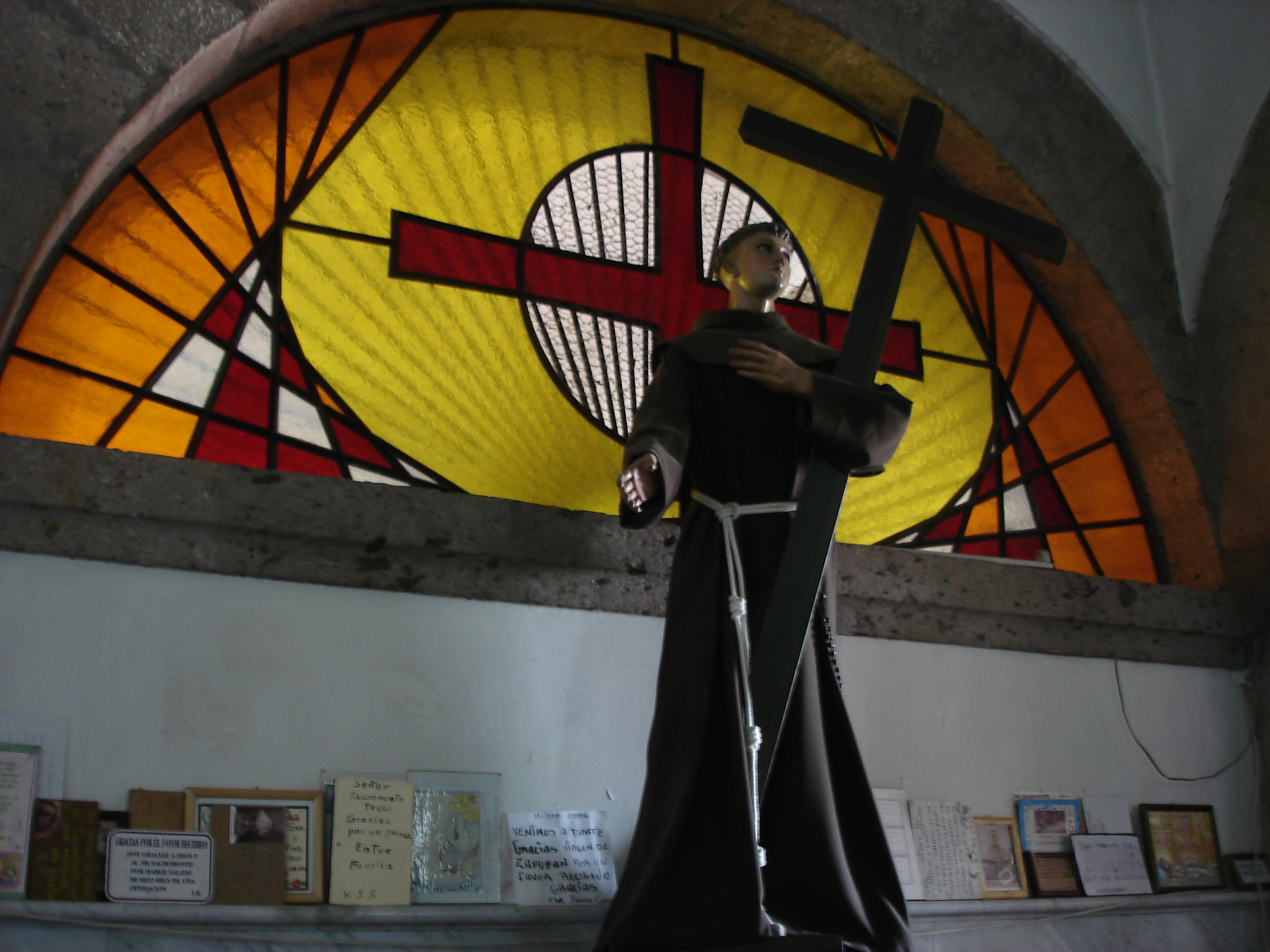 El primer santo mexicano